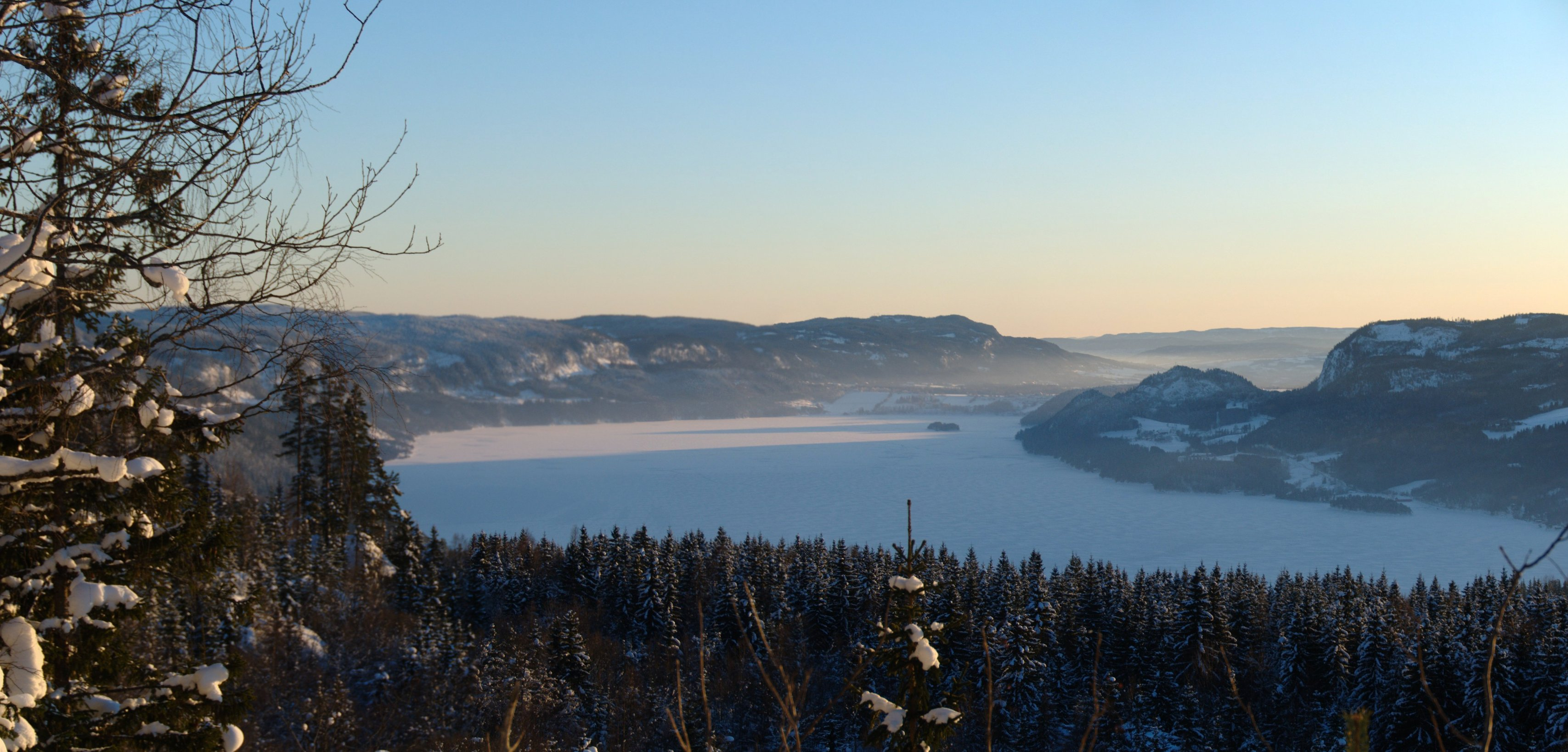 Tur på Krokskogen